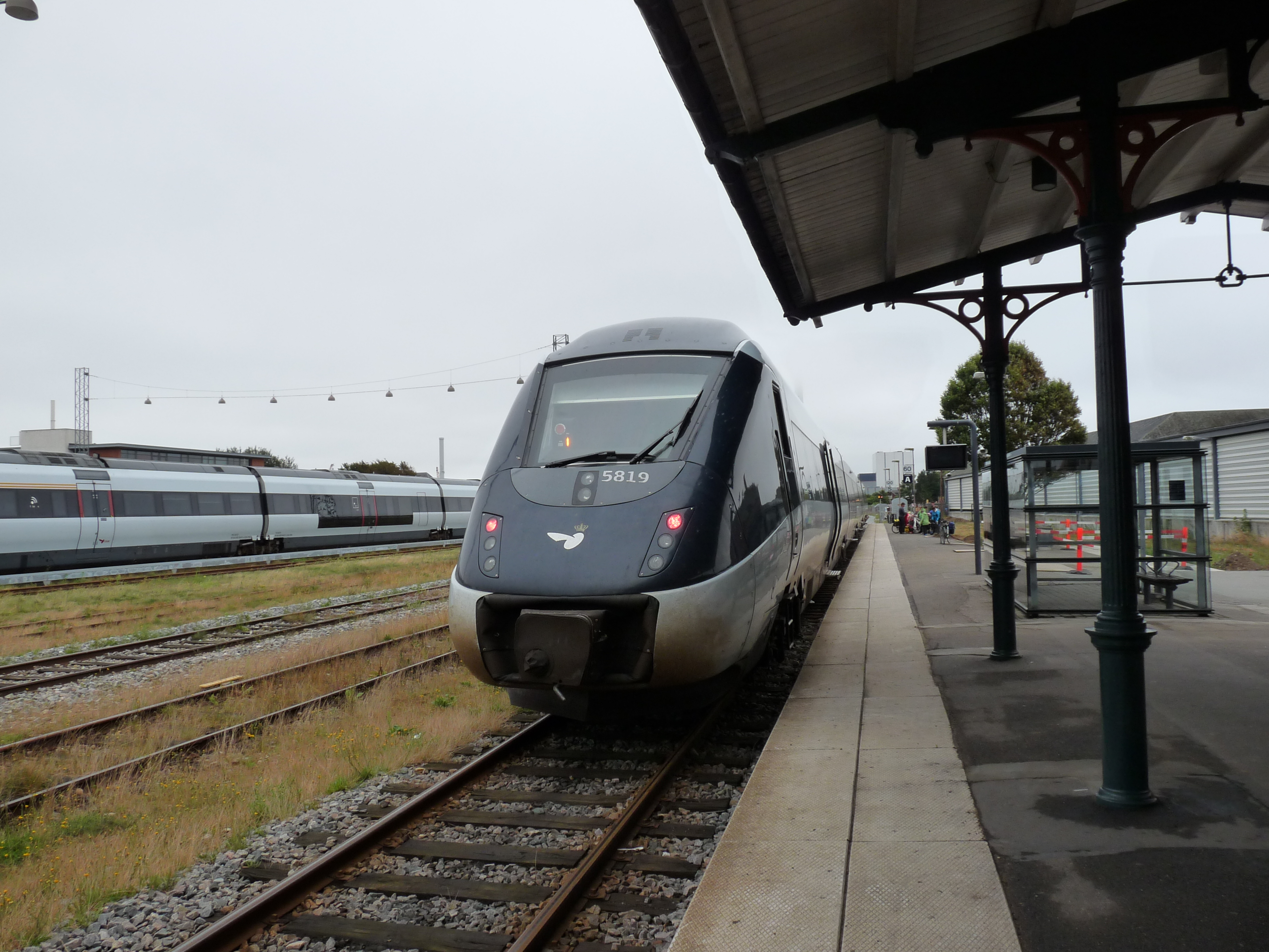 Esbjerg station in juli 2015 met DSB trein.